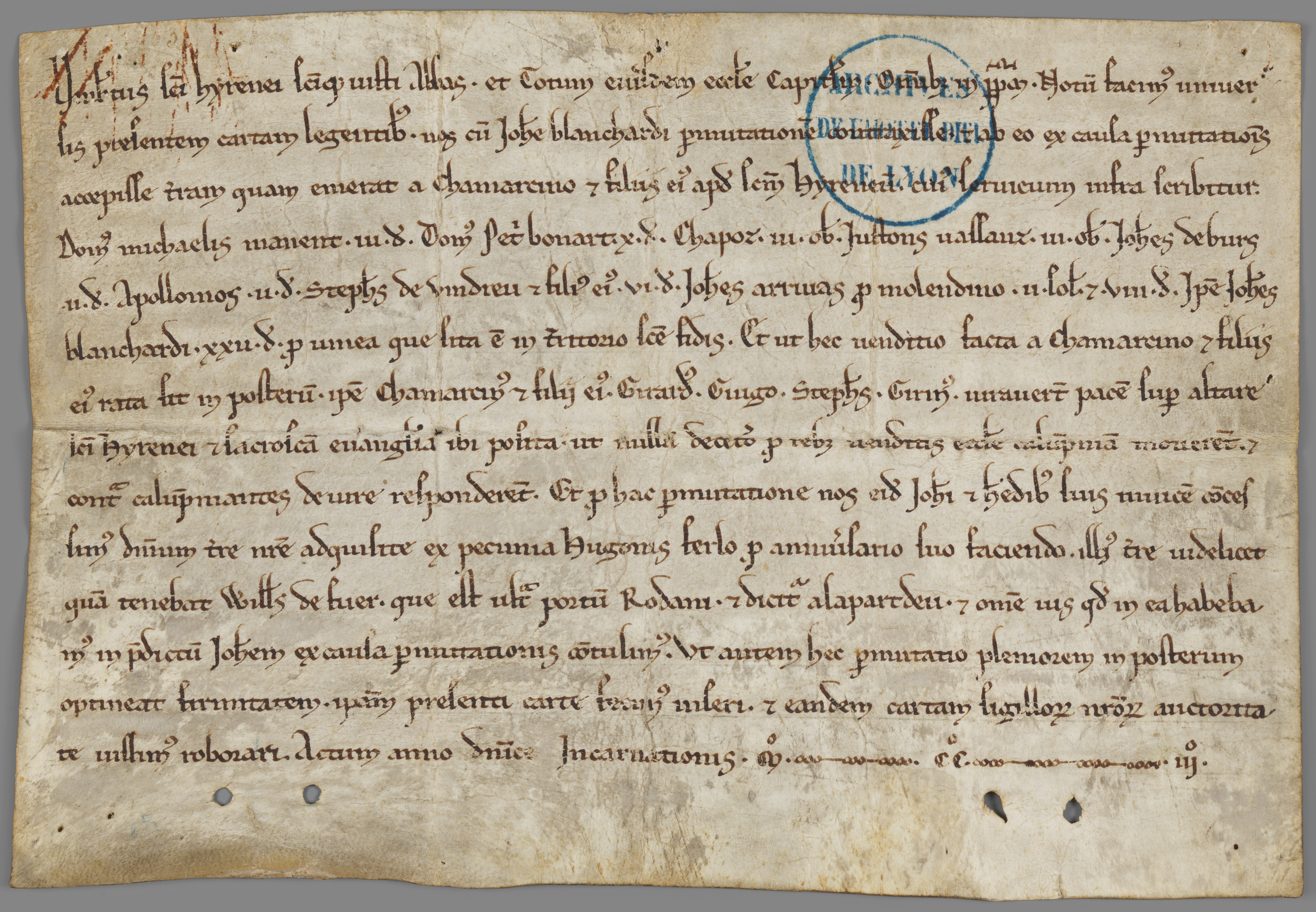 Octroi par Humbert de Beaujeu, abbé de Saint-Irénée, à Jean Blanchard, de la terre de la Part-Dieu en échange du revenu de maisons à Lyon, 1203. Exposé aux Archives départementales du Rhône dans " La Part-Dieu 800 ans d'histoire ". Archives municipales de Lyon, fonds de l'Hôtel Dieu, cote : HD/B208.